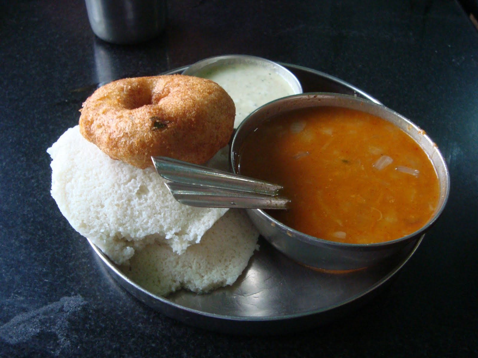 Idly, Vada at a restaurant in Bangalore